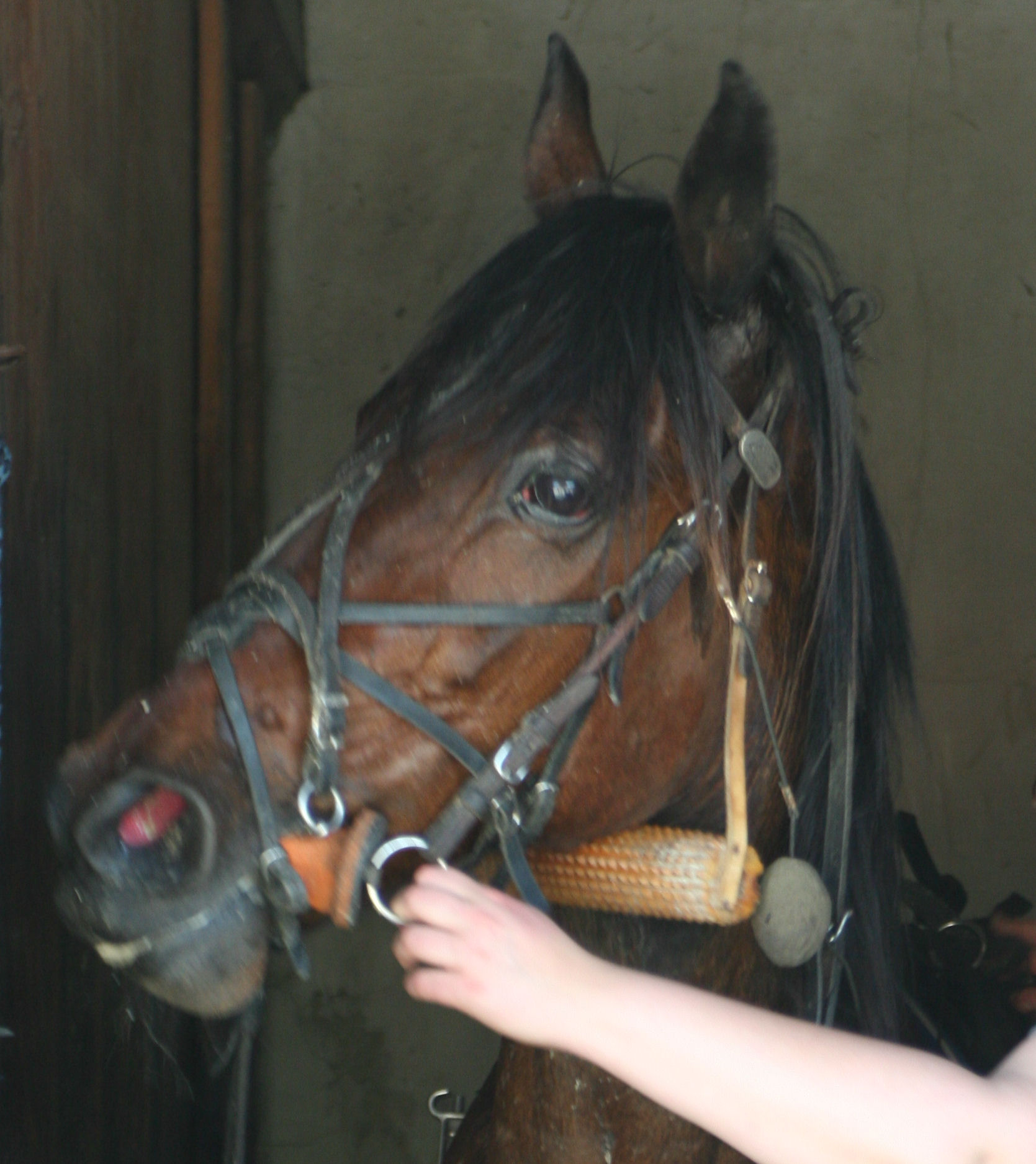 Pullrolle